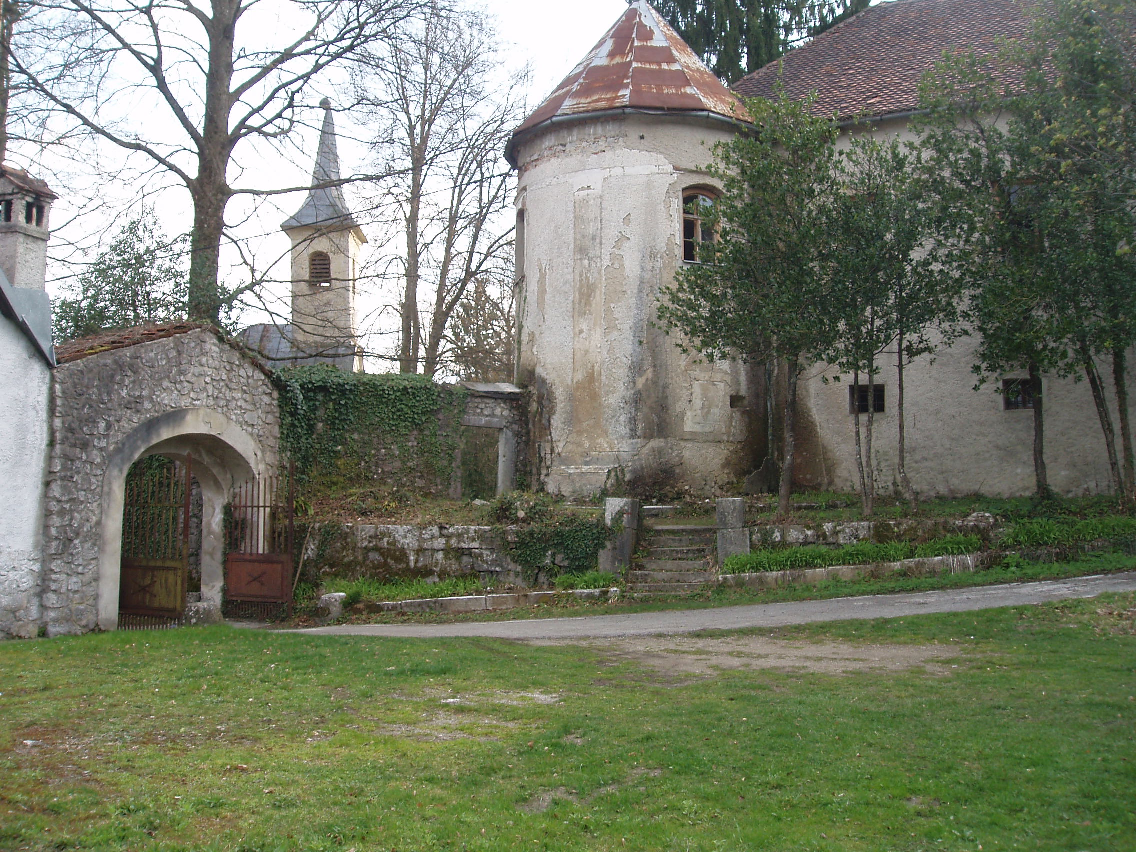 dvorac